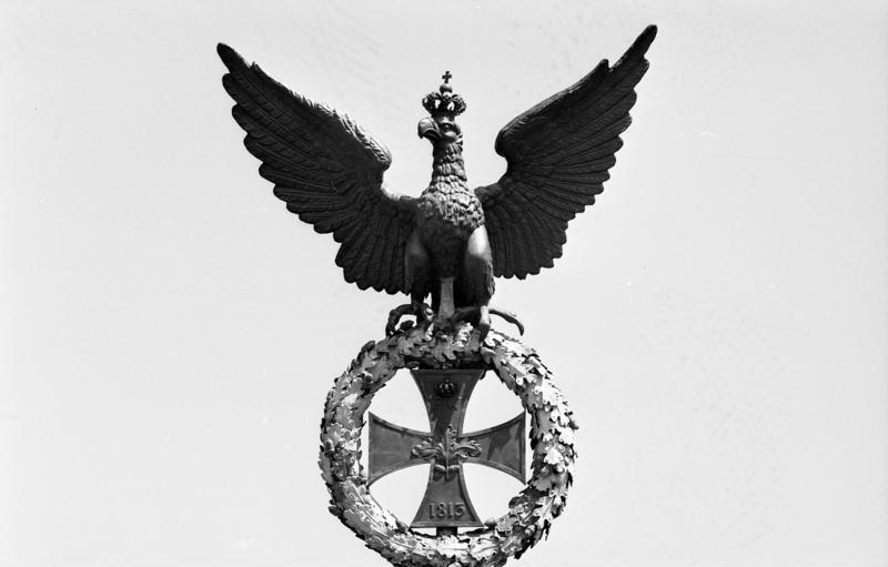 Berlin, 7.7.1991 Die Quadiga des Brandenburger Tores, das von Johann Gottfried Schadow konzipierte kupferne Kunstwerk der Siegesgöttin mit Pferdegespann, wurde nach umfangreicher Restaurierung im Berliner Museum für Verkehr und Technik feierlich enthüllt. Nach schweren Beschädigungen in der Silvesternacht 1989/1990 waren aufwendige Restaurierungsarbeiten erforderlich geworden, die mehr als 200 000 DM kosteten. Zum 200. Geburtstag des Brandenburger Tores am 6.8.1991 wird die 1789 in Auftrag gegebene und 1794 fertiggestellte Quadrina wieder an ihrem alten Platz auf dem Brandenburger Tor sein.